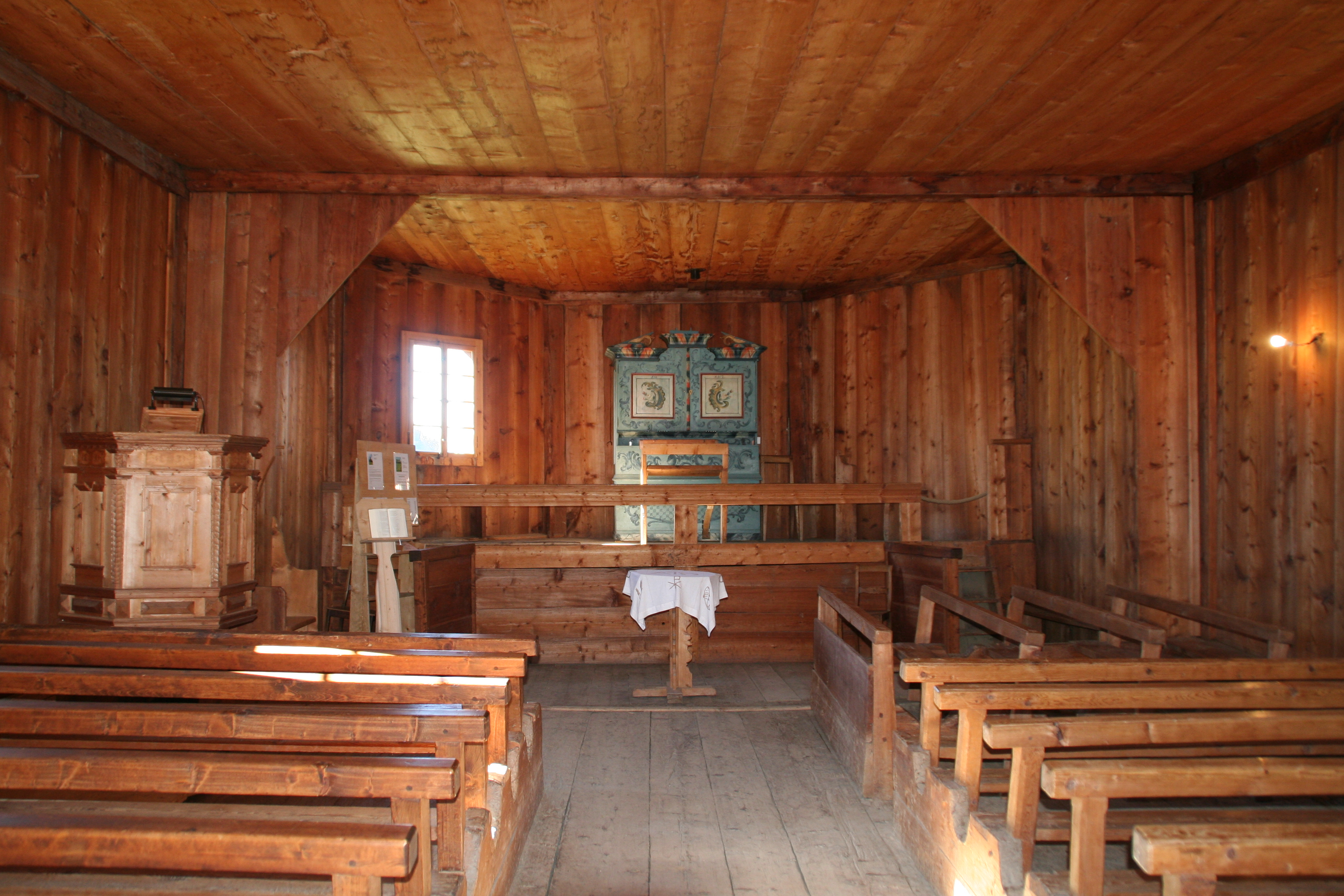 Reformierte Kirche Obermutten Innenraum